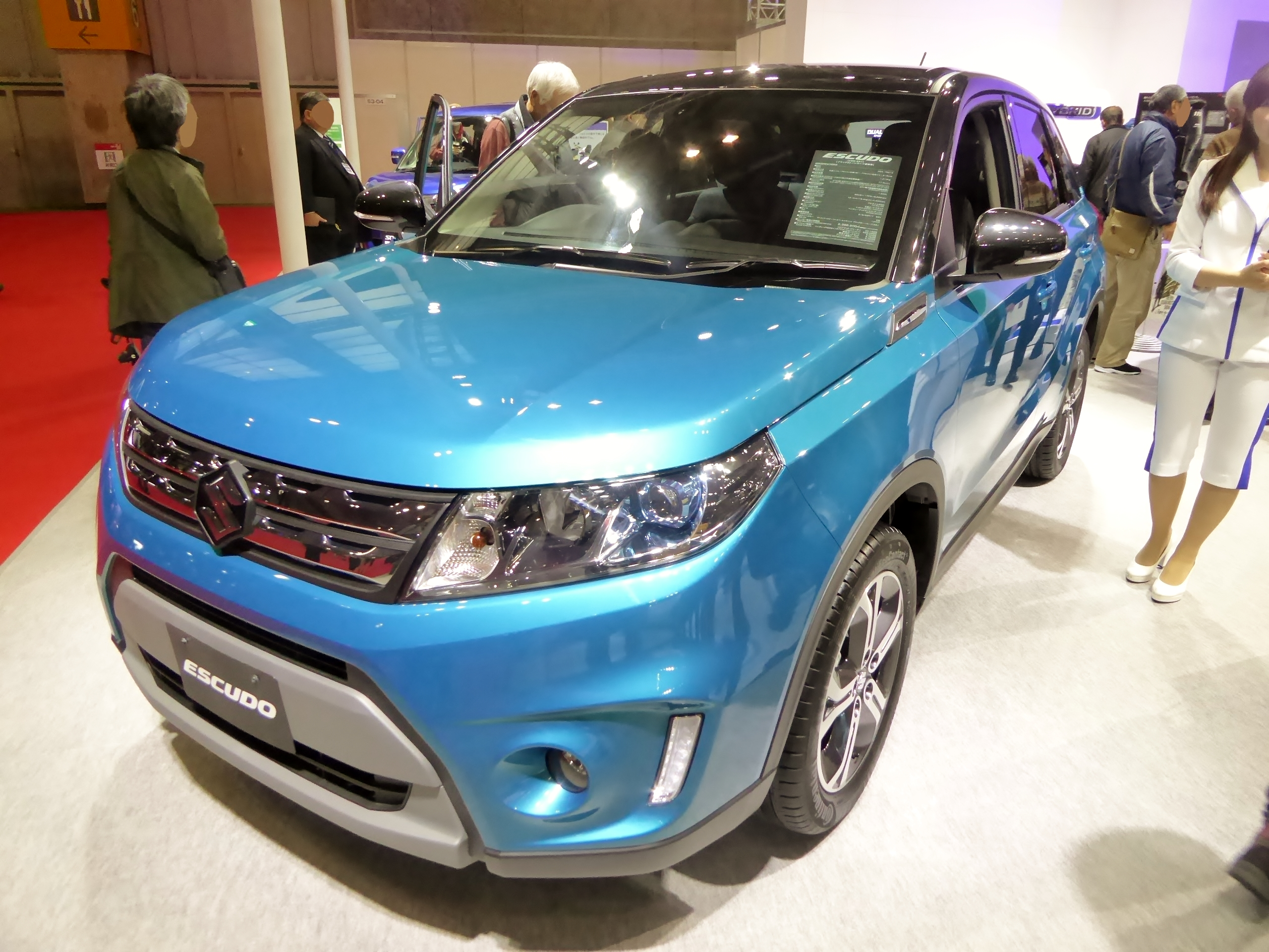 大阪モーターショー2015においてDBA-YE21S型スズキ・エスクードを撮影。